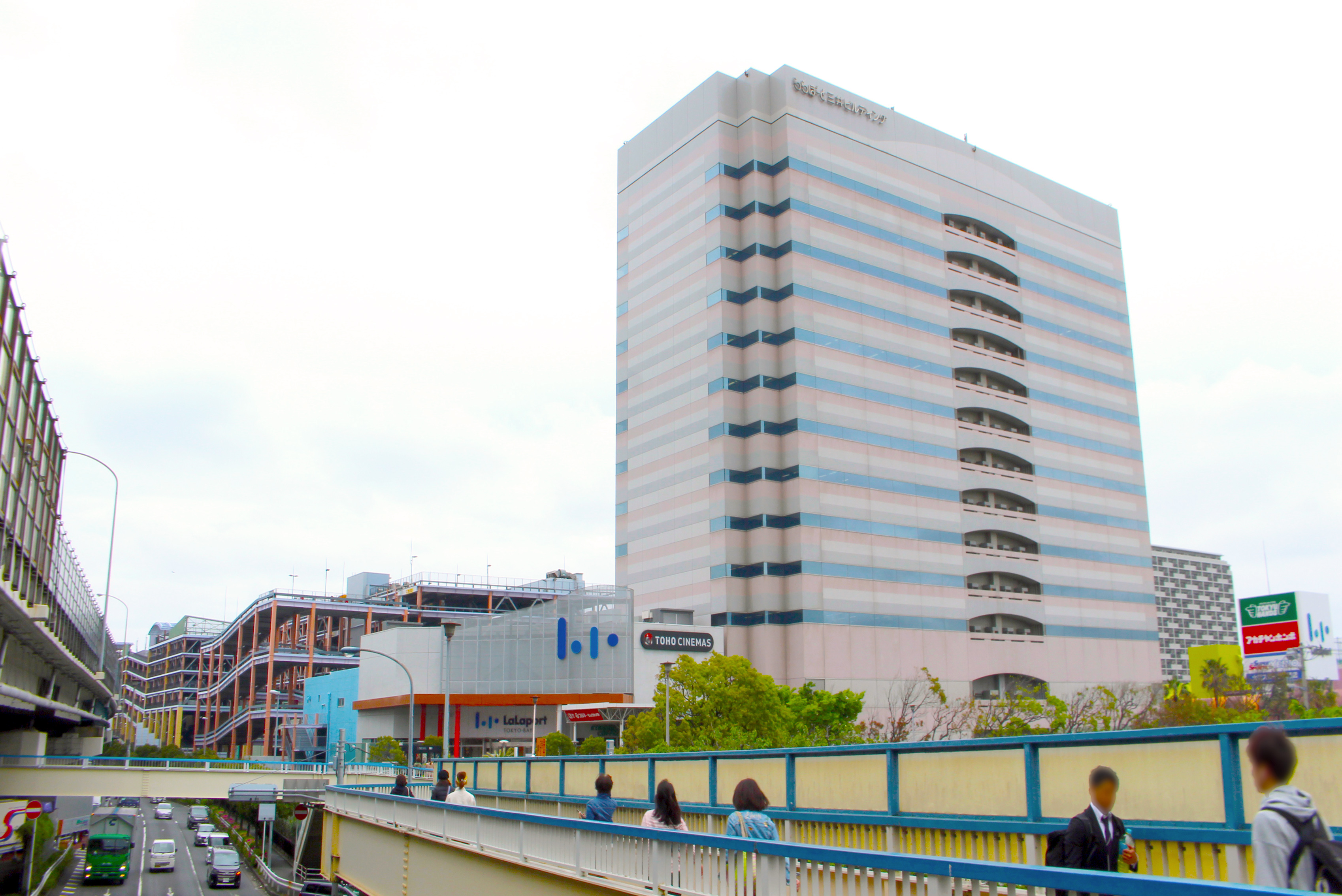 LaLaport Funabashi 20190428